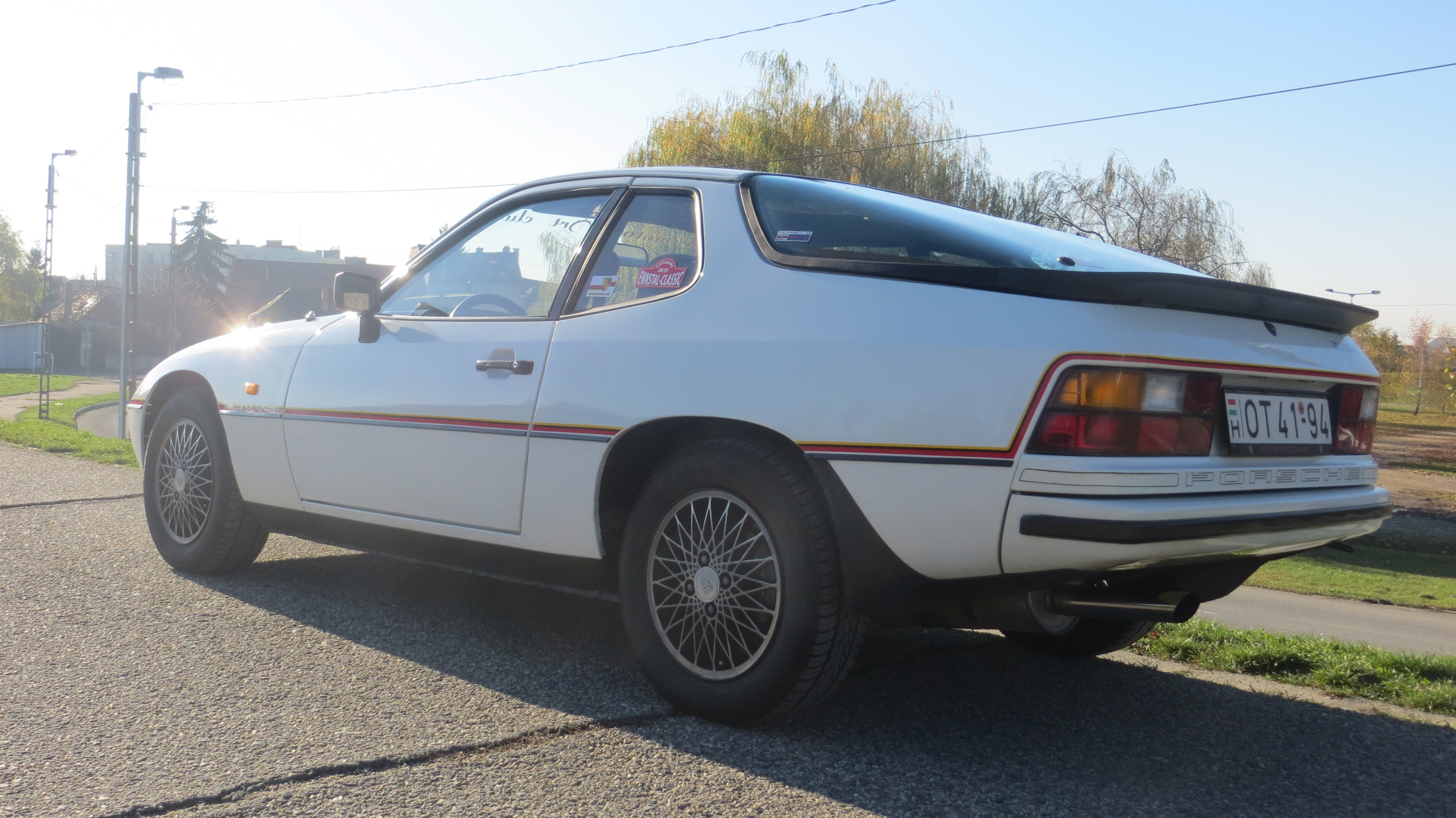 Ez a különleges modell a Porsche Le Mans-i 24 órás autóversenyeken elért hatalmas sikerei előtti tisztelgés. Összesen 1002 darab (más források szerint 1030) épült a modellből, mindegyik alpesifehér színben, körbefutó sárga-fekete-vörös díszítő csíkkal, az első sárvédőkön ugyanilyen színű Le Mans felirattal. A modellen a 924 Turbo hátsó spoilere van, 6J×15-ATS Turbo-Look keréktárcsák, belül csíkos „Nadelstreifen” kárpitozású Turbo ülések fehér szegéllyel, 36 cm átmérőjű négyküllős bőrkormány, bőr váltógomb, az ajtóküszöbön fekete alapon fehér 924 felirat. A gépkocsihoz többféle extrát is lehetett rendelni, elektromos ablakot, elektromosan állítható külső tükröket, hátsó ablaktörlőt, fényszórómosót, légkondicionálót és kivehető targatetőt is. Jobbkormányos kivitelben 100 darab készült.